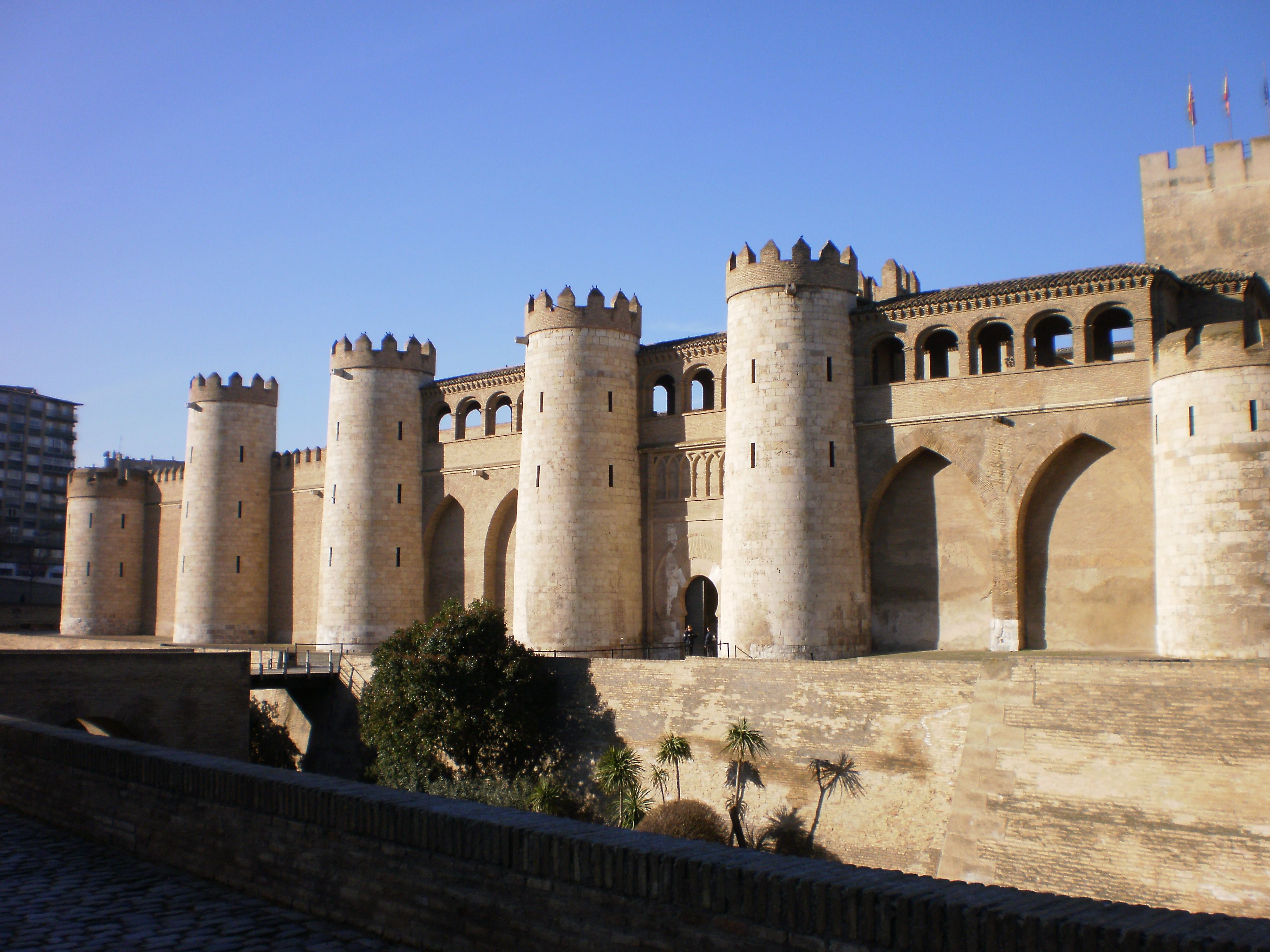 La Aljafería, Zaragoza